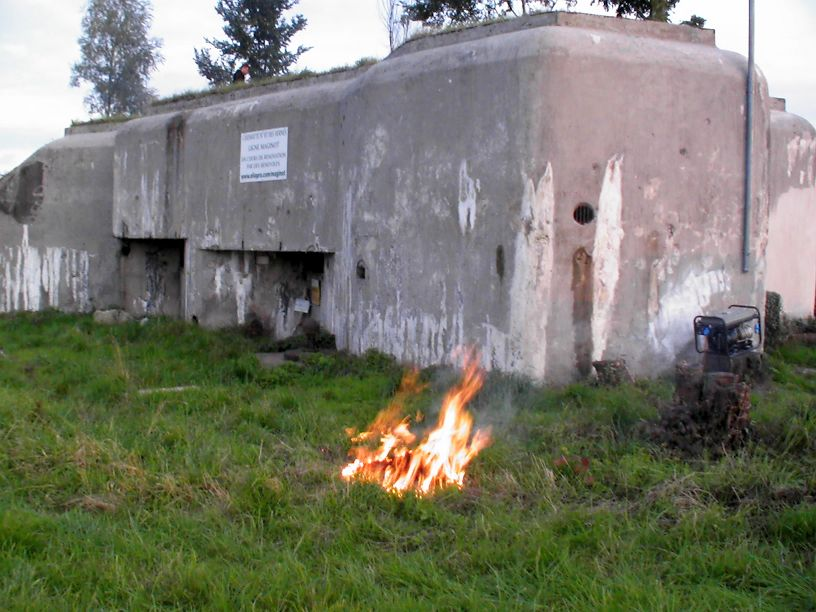 La façade de la casemate des Verne a été nettoyé au jet d'eau haute pressions et les mauvaises herbes brulés.